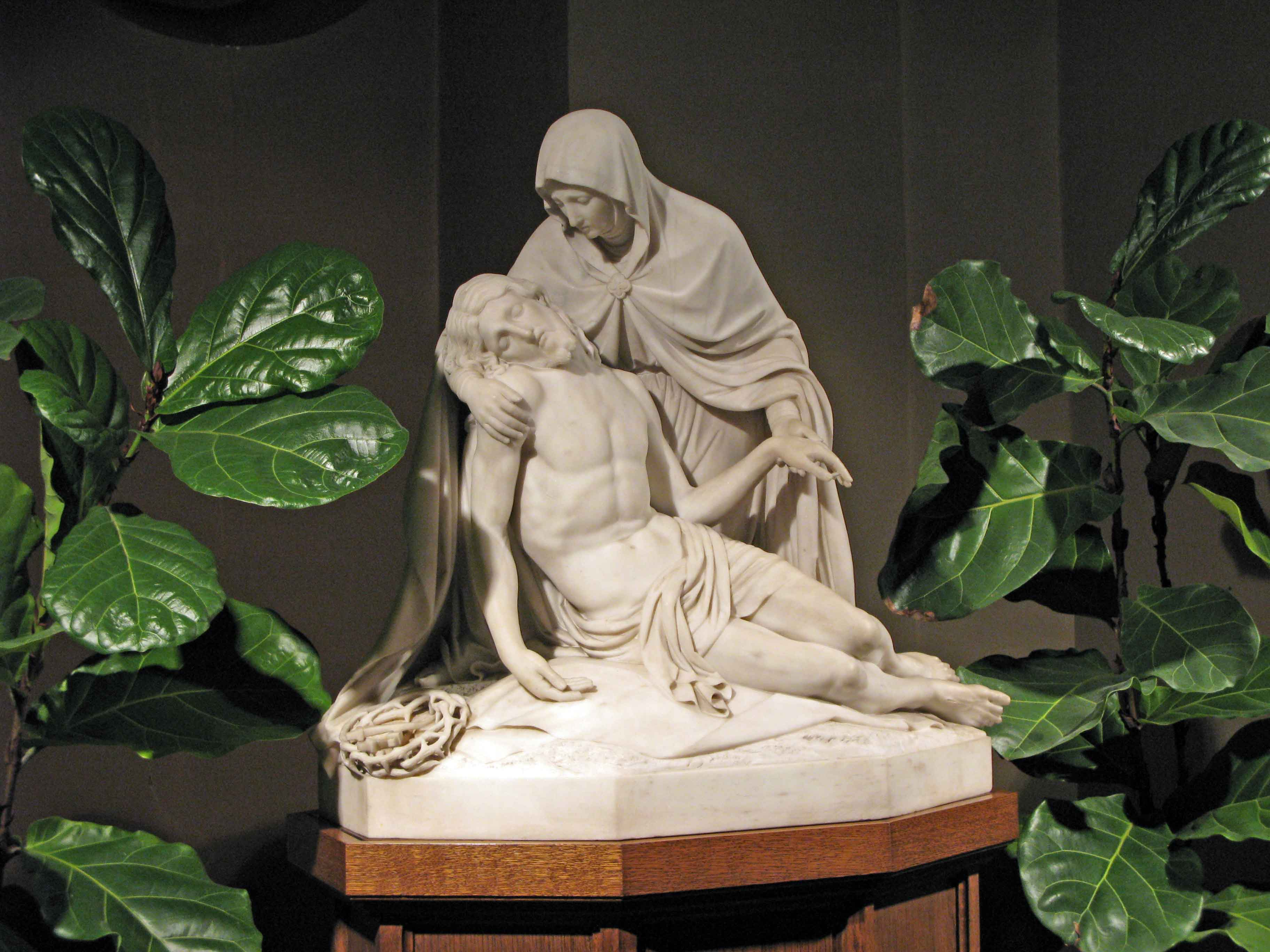 Pietà DIK.